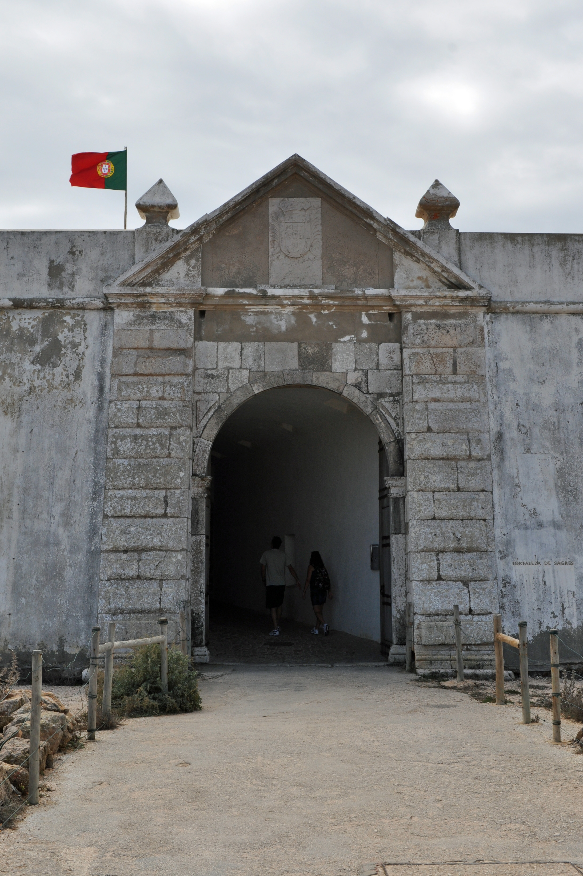 Fortaleza de Sagres (2012-09-25), by Klugschnacker in Wikipedia (60)